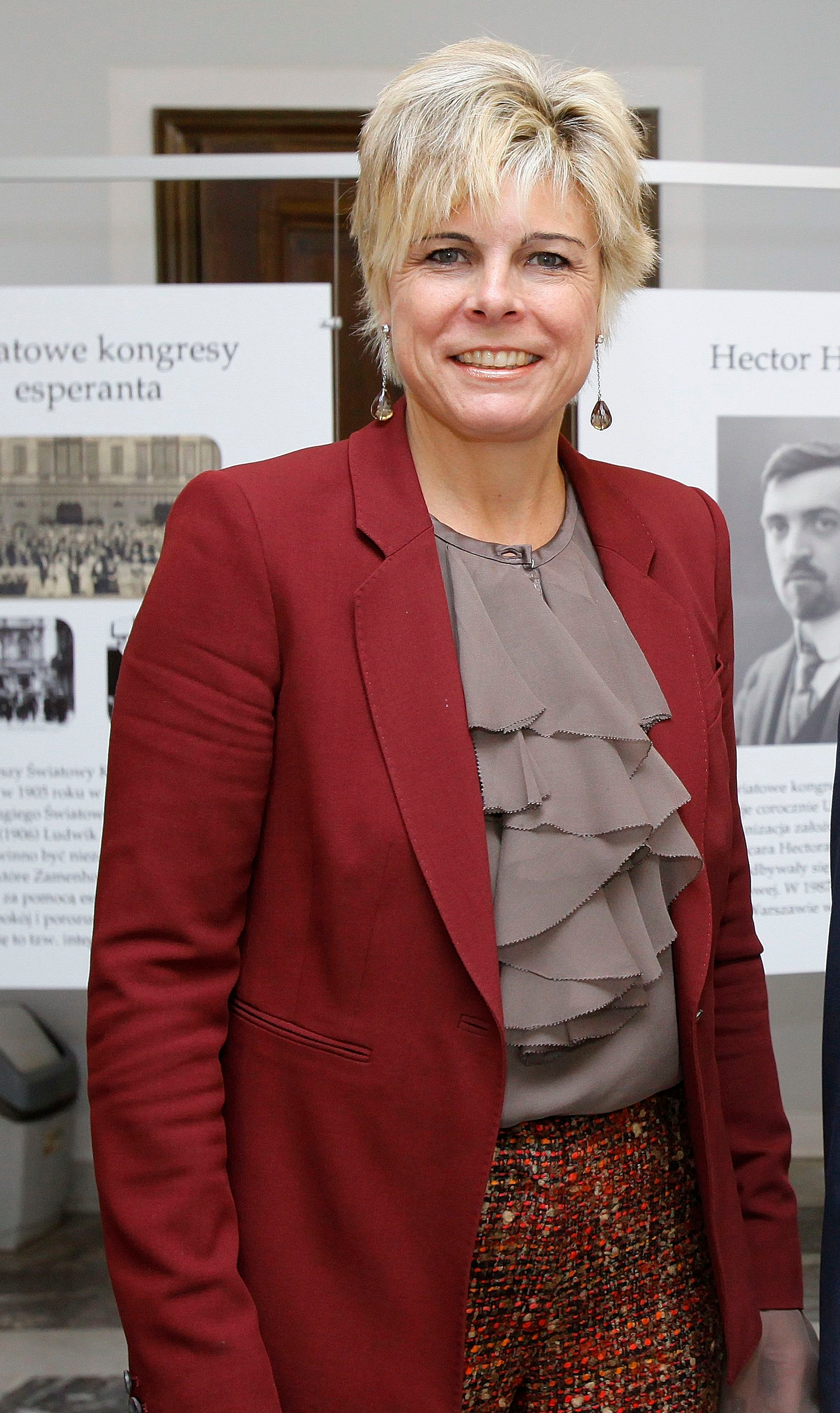 La princesse Laurentien des Pays-Bas au Sénat polonais.